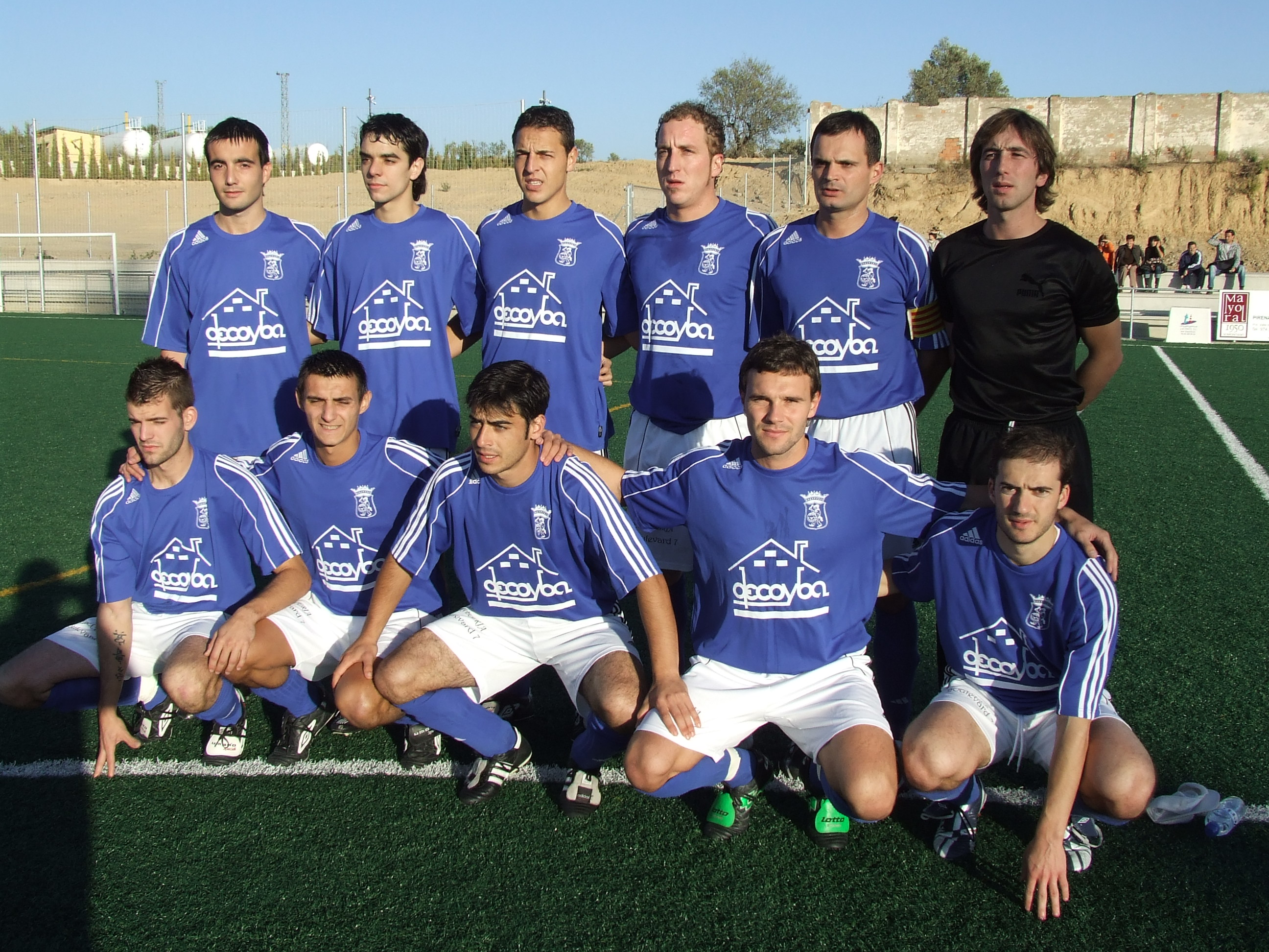 Peña Ferranca